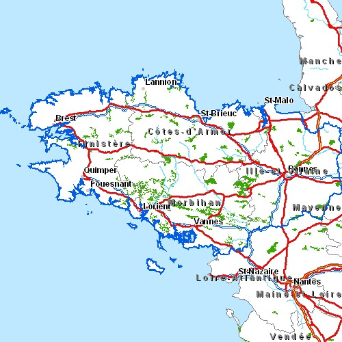 Carte routière de Bretagne Légende